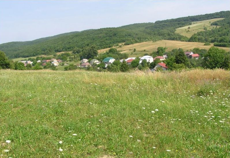 Celkový pohľad na Bystrú